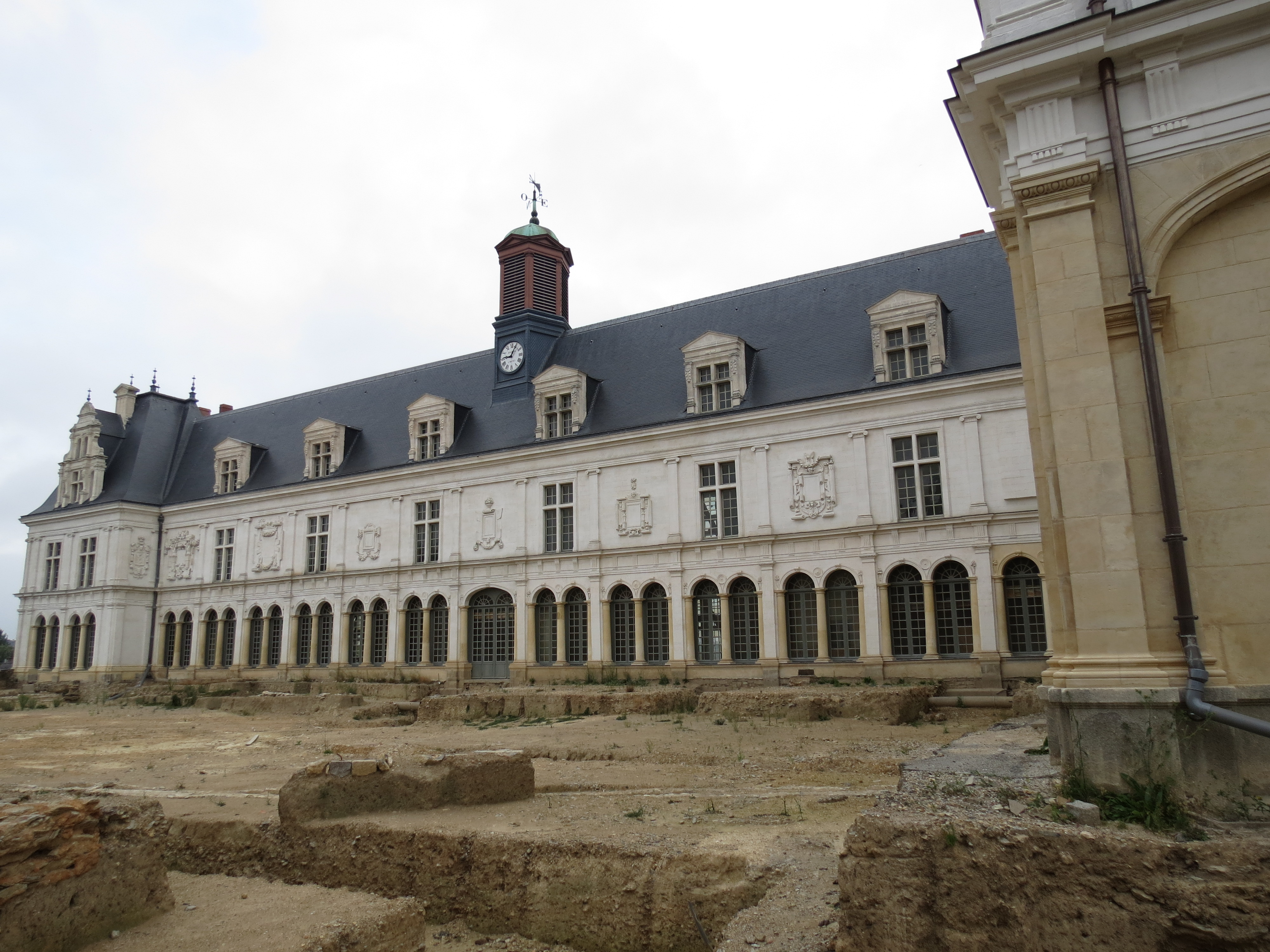 Palais de Justice, Laval, Mayenne, Pays de la Loire.